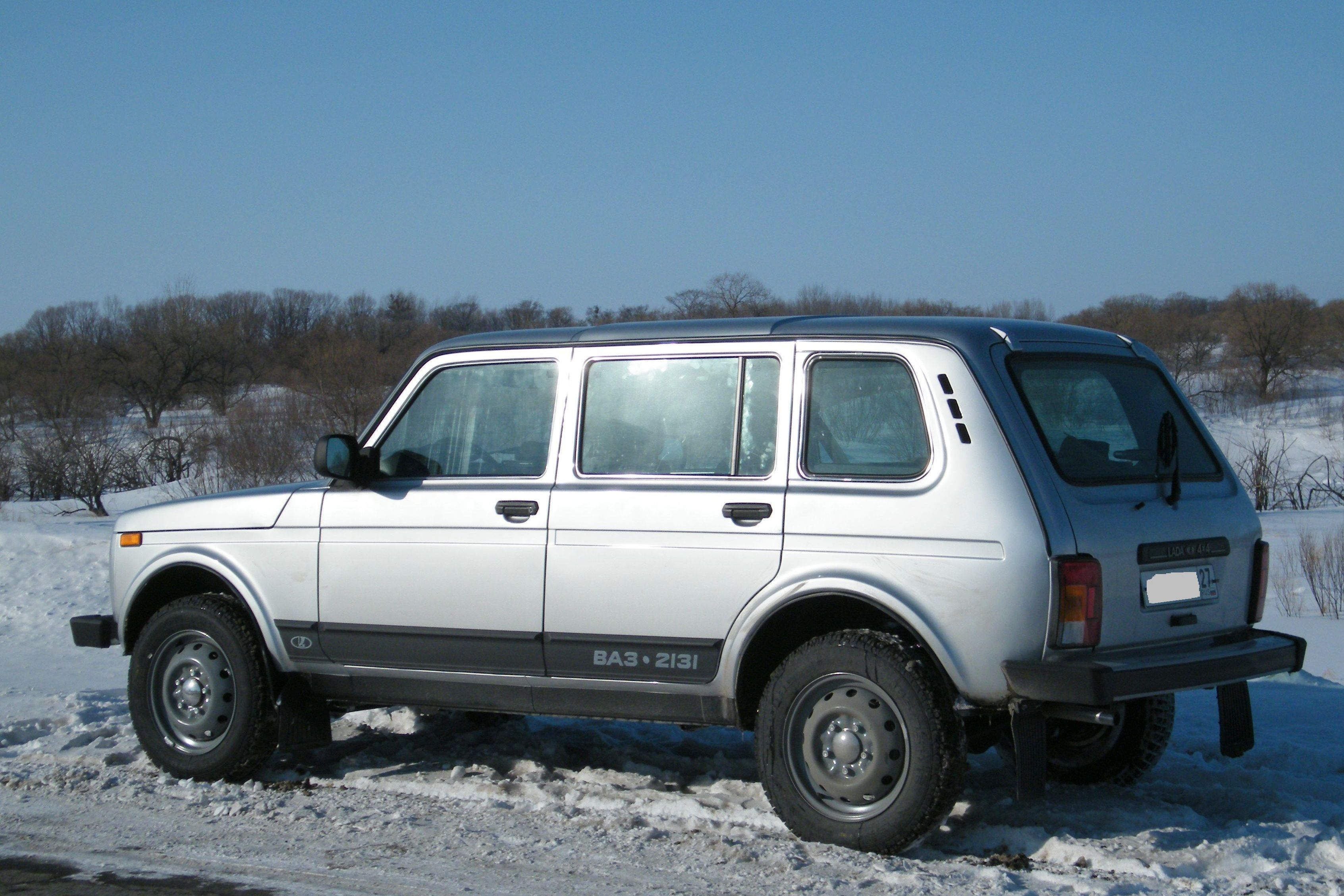 Lada Niva 2131